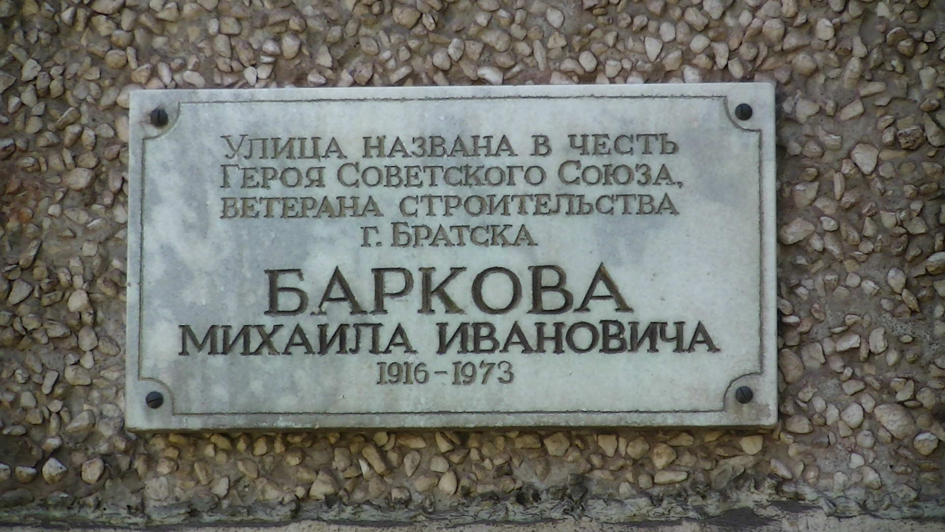 Мемориальная доска Герою Советского Союза Михаилу Ивановичу Баркову: улица Баркова, Братск, Иркутская область